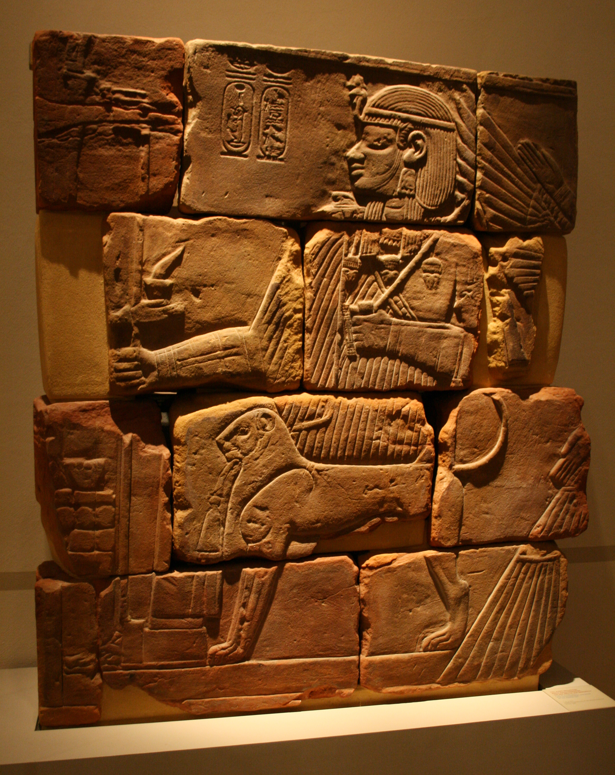 Wand aus der Pyramiden-Kapelle des Amanitenmomide in Meroe (heute: Ägyptisches Museum Berlin, Inv. Nr. 2260)